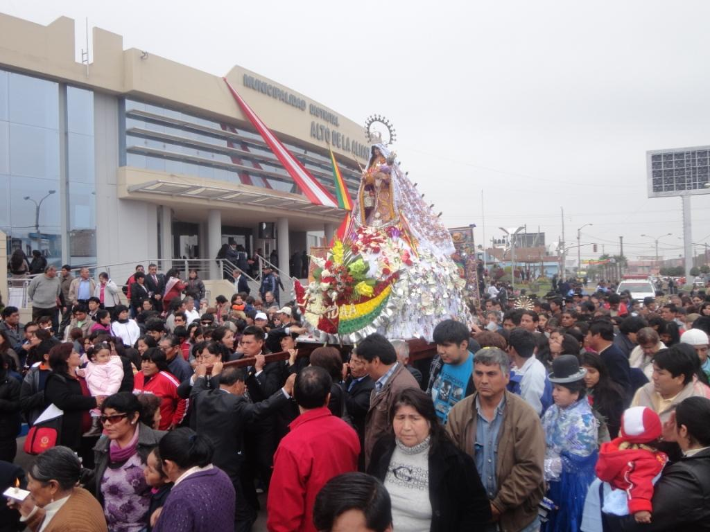 Procesion de Virgen de Copacabana